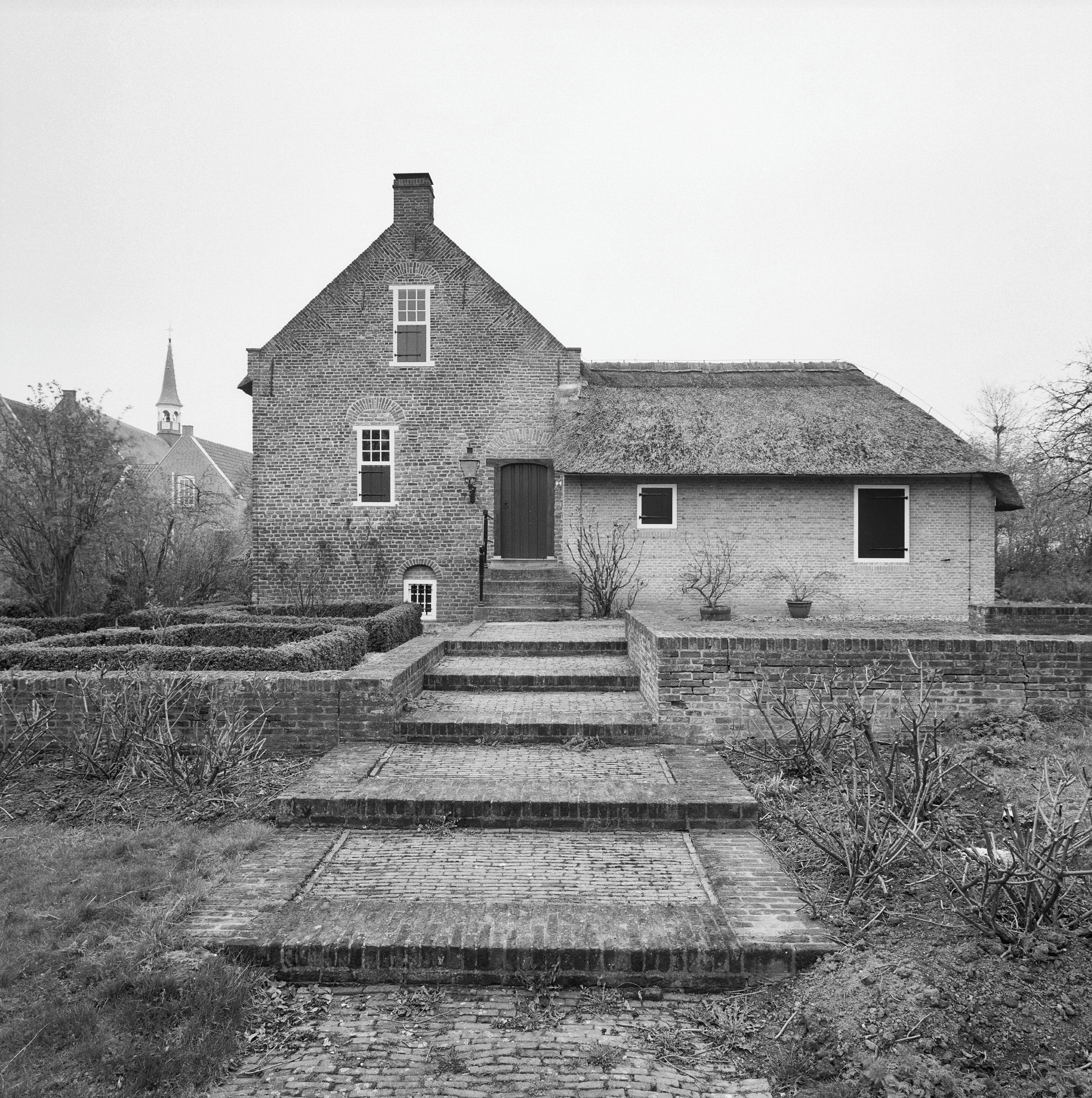 Slotje Babylonienbroek: Overzicht voorgevel (opmerking: Gefotografeerd voor Monumenten In Nederland Noord-Brabant)